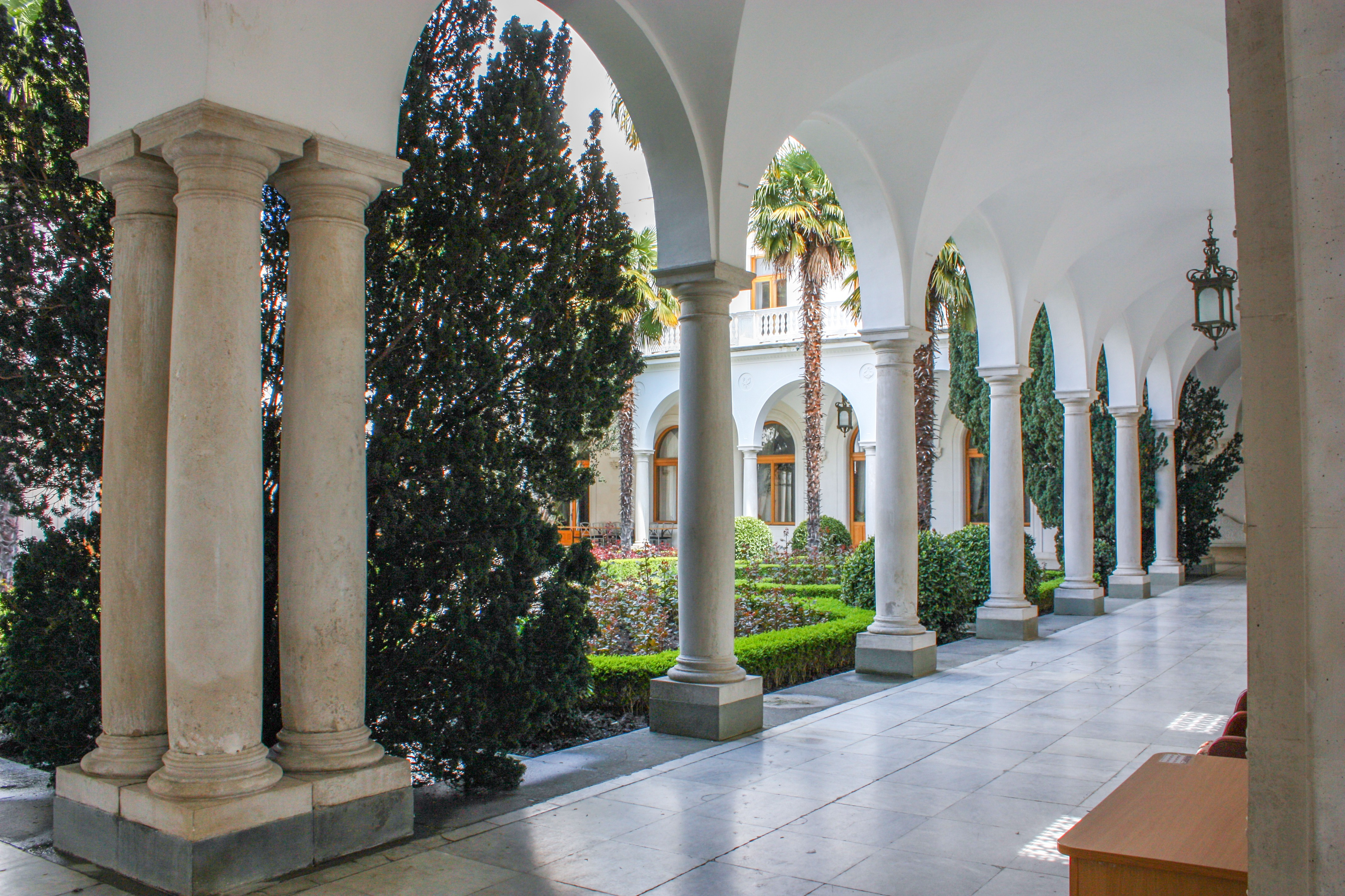 Лівадійський палацовий комплекс, Лівадія, вул. Батурина, 44